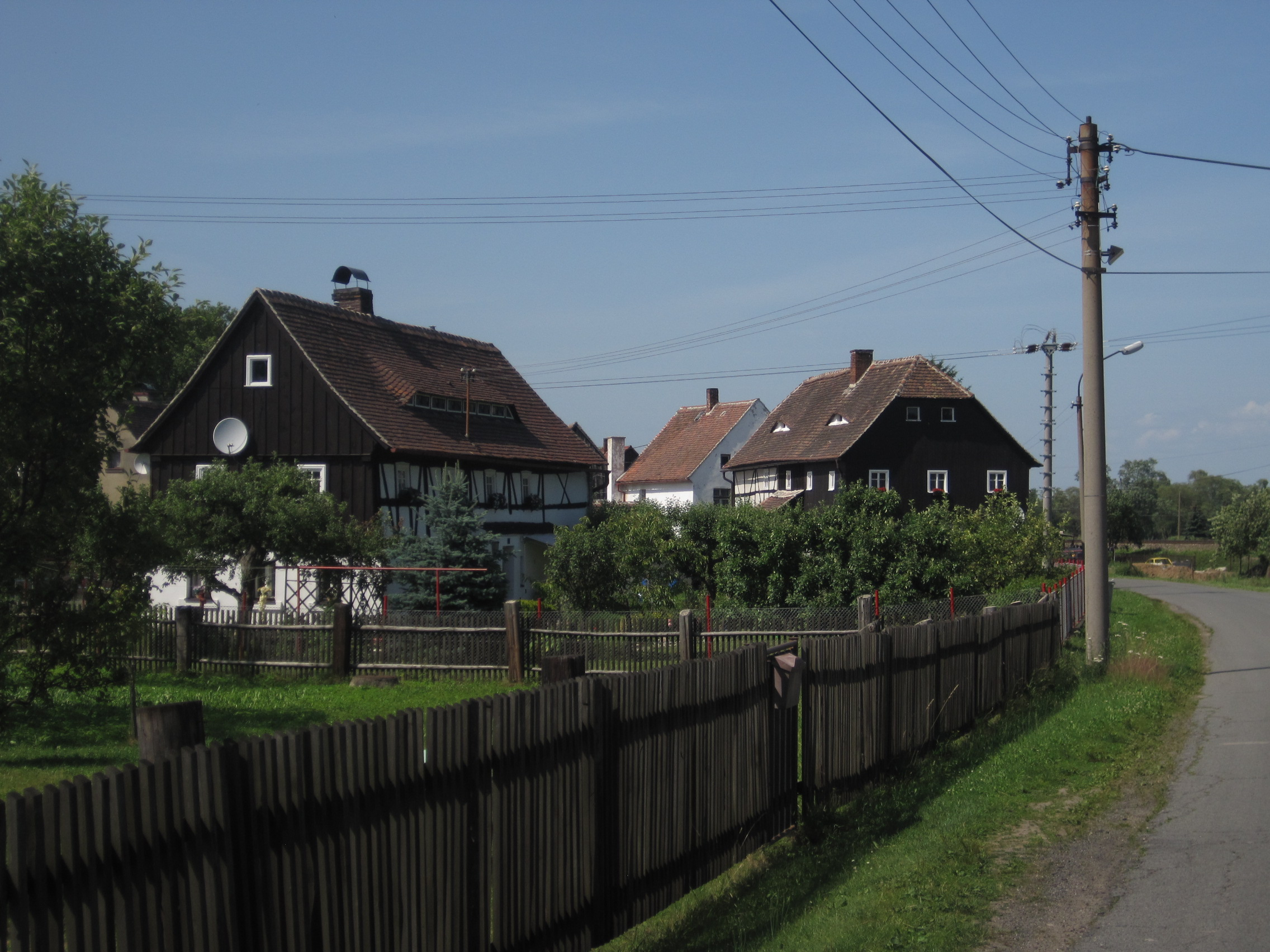 Minkovice - lidová architektura čp. 21 (vlevo), 14 (vzadu) a 15 (vpravo)